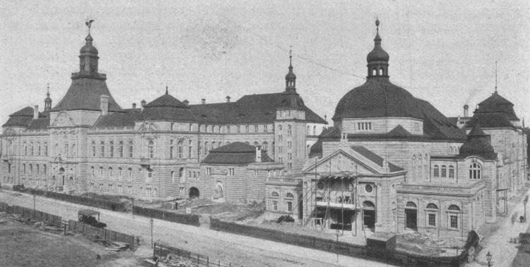 Die am 2. November 1902 eingeweihte Königliche Hochschule der Künste in Berlin.